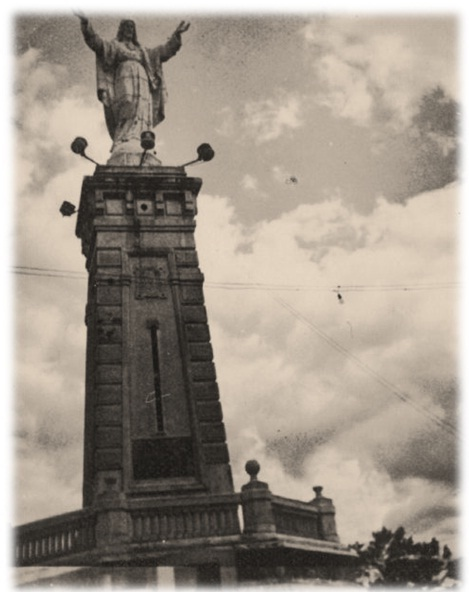 fotografia realizada por Gerardo Emilio San clemente Zárate